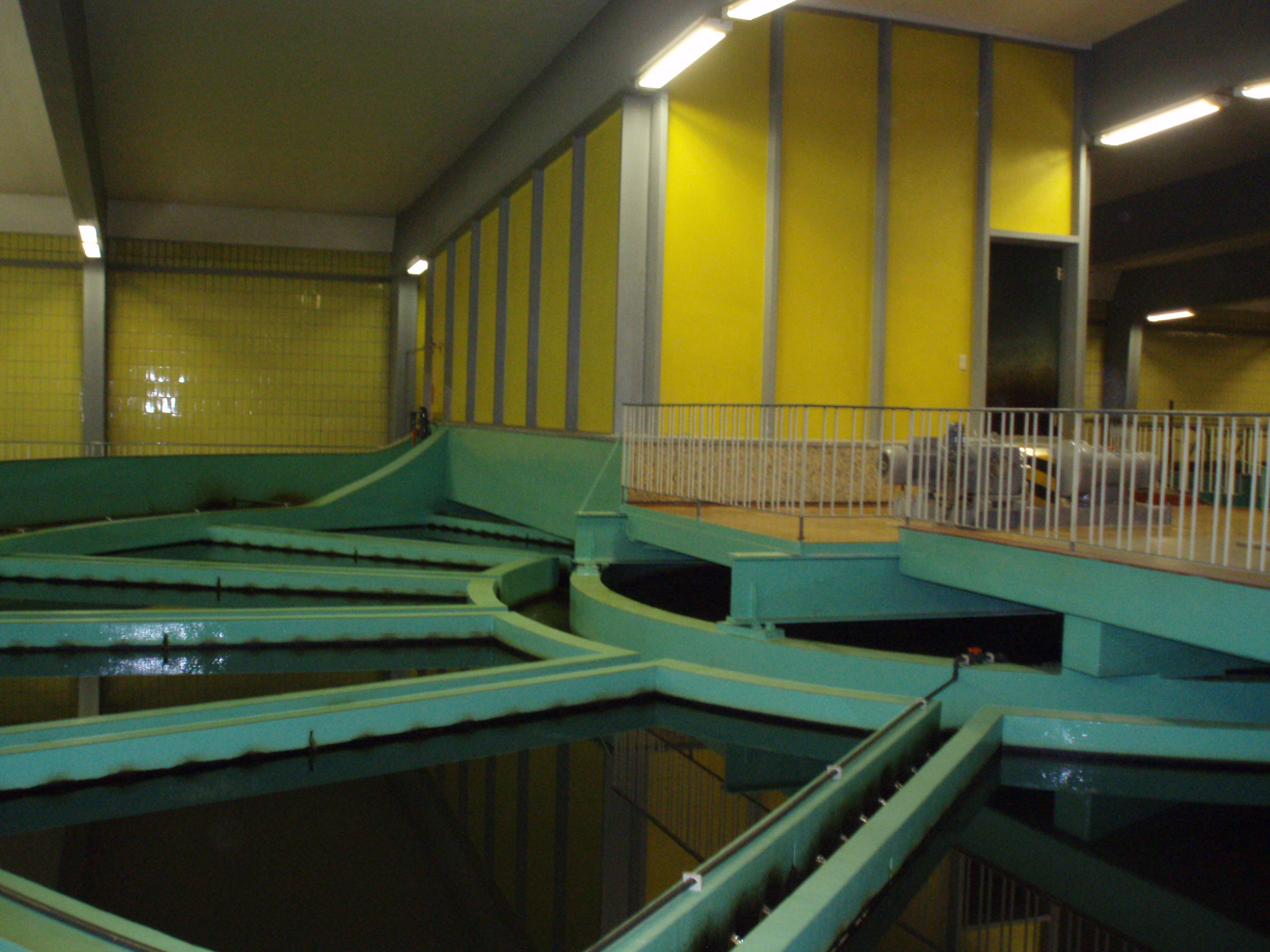 Wasserwerk Fuhrberg, Accelator am 2009-09-13